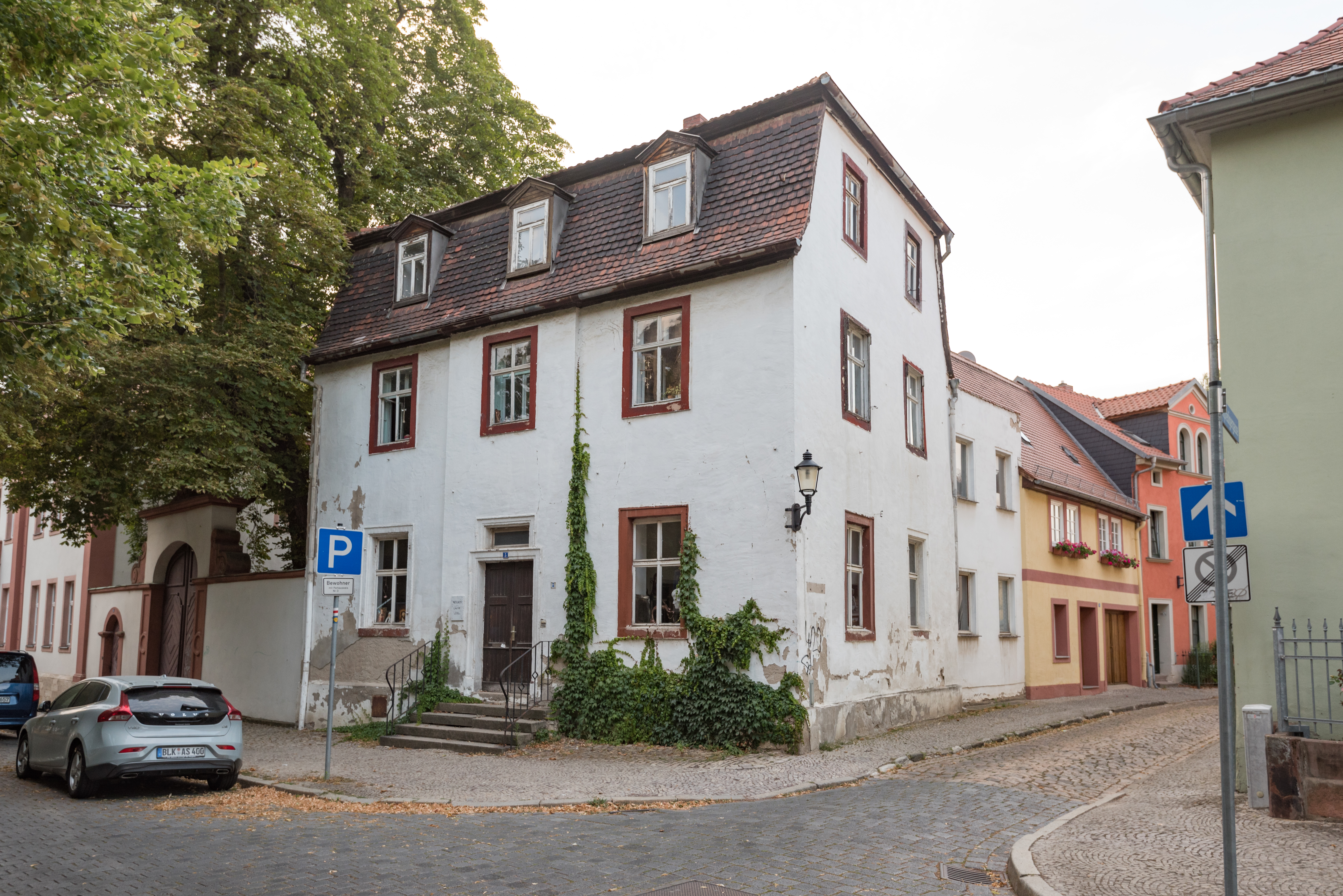 Naumburg (Saale), Domplatz 5